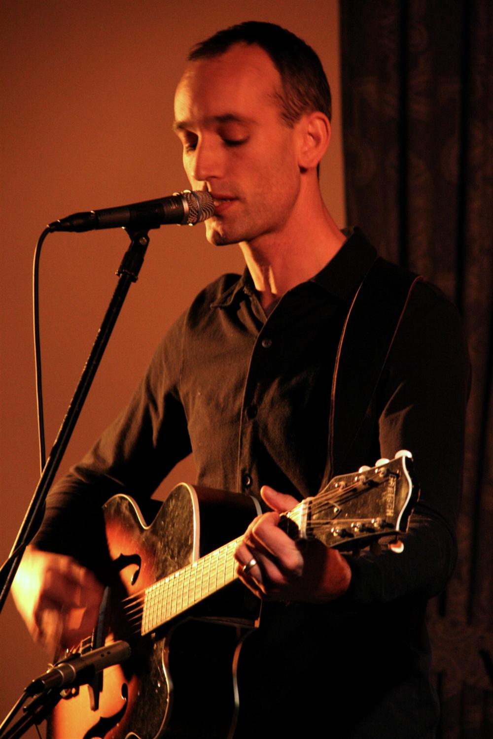 Live at Café Blue Hills 1/12/2008